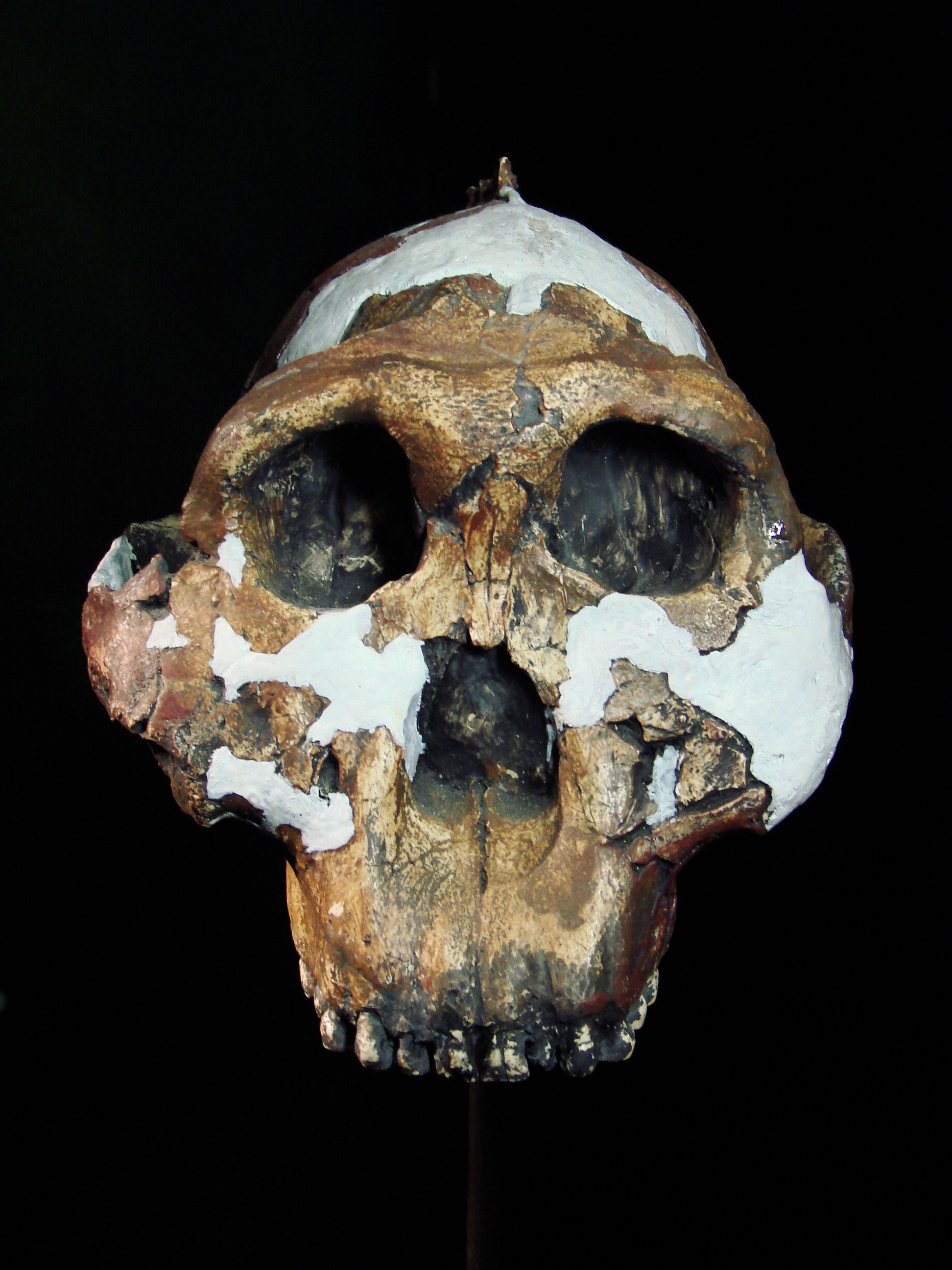 Muséum d'Anthropologie, campus universitaire d'Irchel, Université de Zurich (Suisse) : Paranthropus boisei, numéro identification OH 5 (Olduvai, Tanzanie)